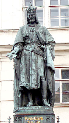 Karl 4. statue i Prag